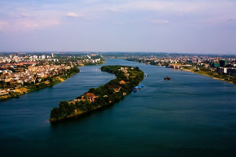 东洲岛一景